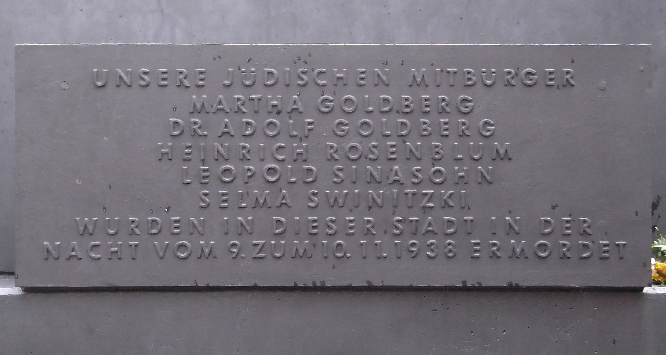 Schrifttafel am Mahnmal für die Opfer der „Reichskristallnacht“ (Reichspogromnacht) in Bremen, Deutschland. Das Mahnmal befindet sich in Bremen-Schnoorviertel, beim Haus Landherrn-Amt.